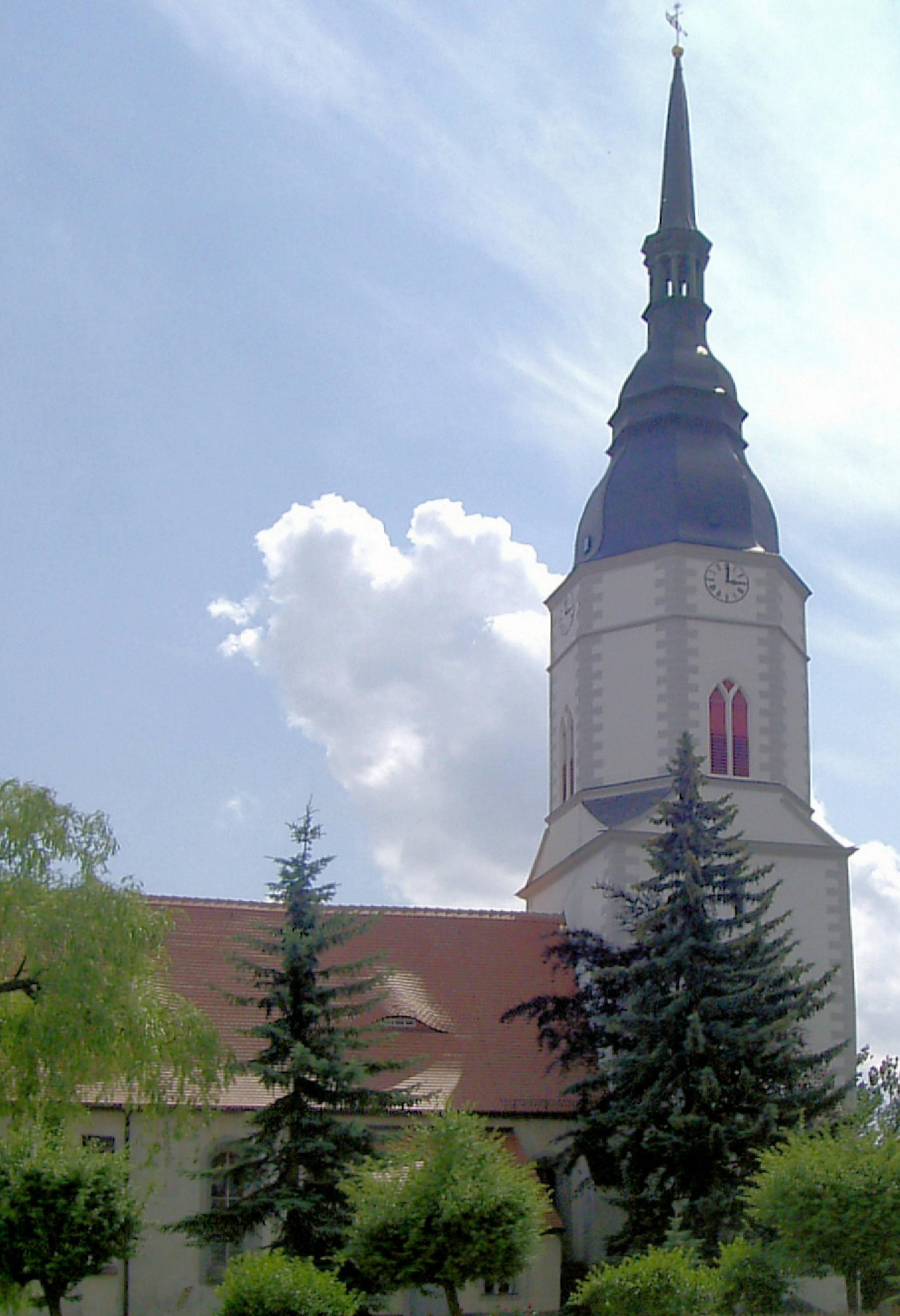 Gotische Kirche in Großthiemig (um 1400)